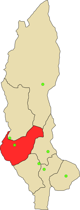 Provincia de Utcubamba de Mendoza en departamento Amazonas